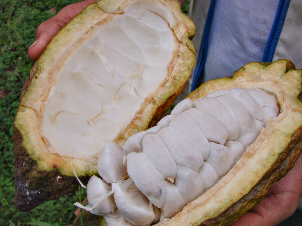 Fruto del albol de cacao producido en san vicente de chucuri - santander colombia